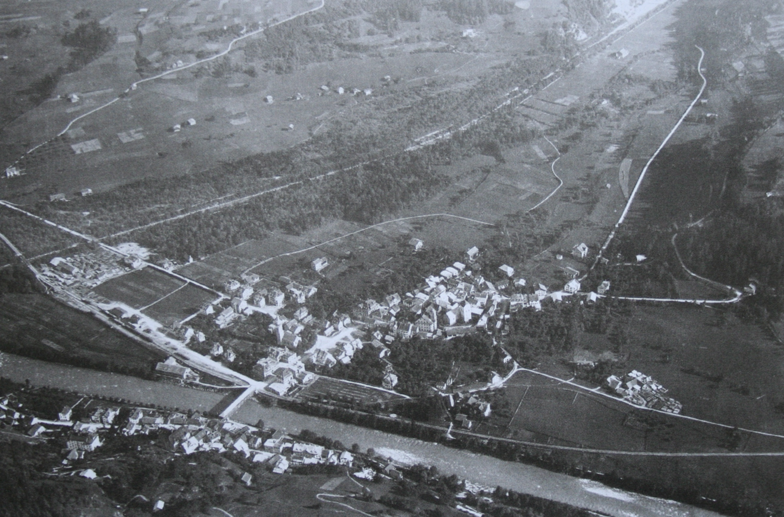 Ilanz GR in der Surselva 1923, Blick nach Osten, Aufnahme von Walter Mittelholzer (1894 - 1937)